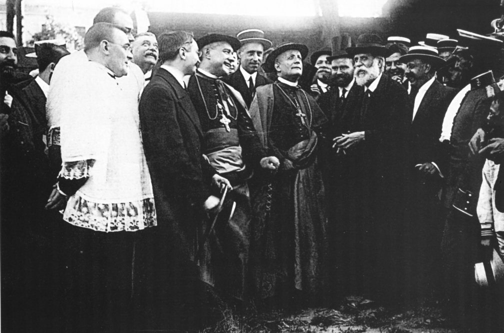 Gaudí y el nuncio Ragonesi visitan la Sagrada Familia (1915).